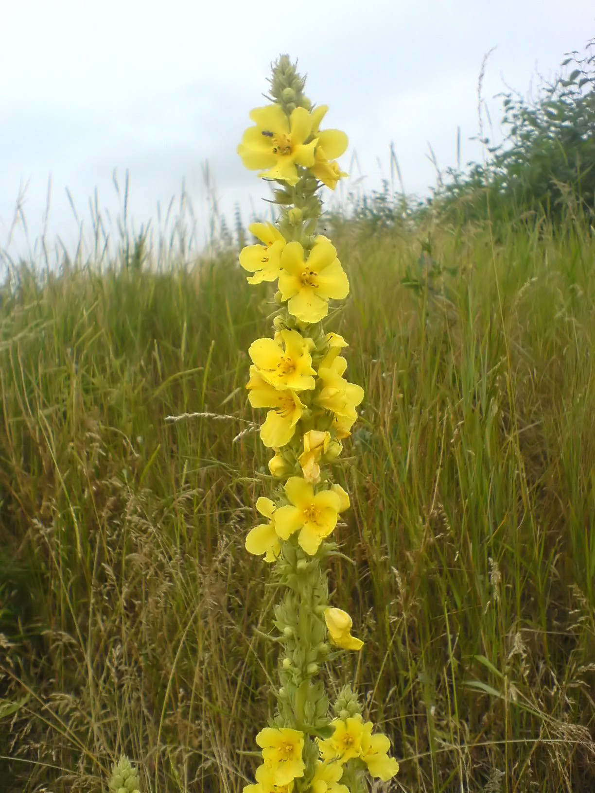 Großblütige Königskerze (Verbascum densiflorum) an einem Straßenrand in Mitteldeutschland, ca. 1,50 m groß